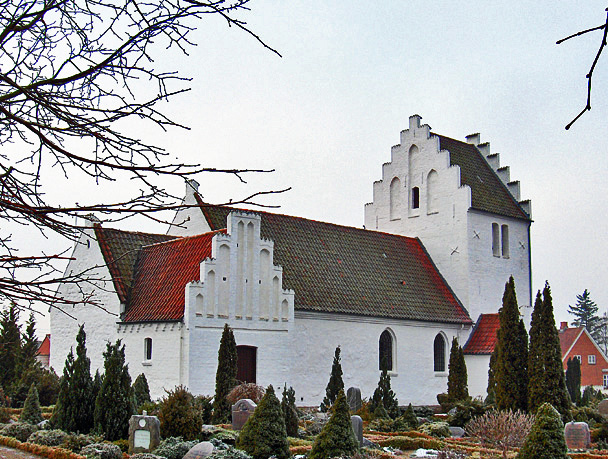 fra nordøst